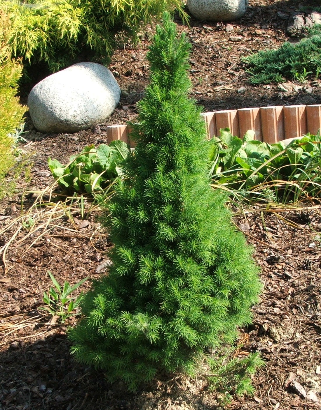 Picea glauca 'Conica'